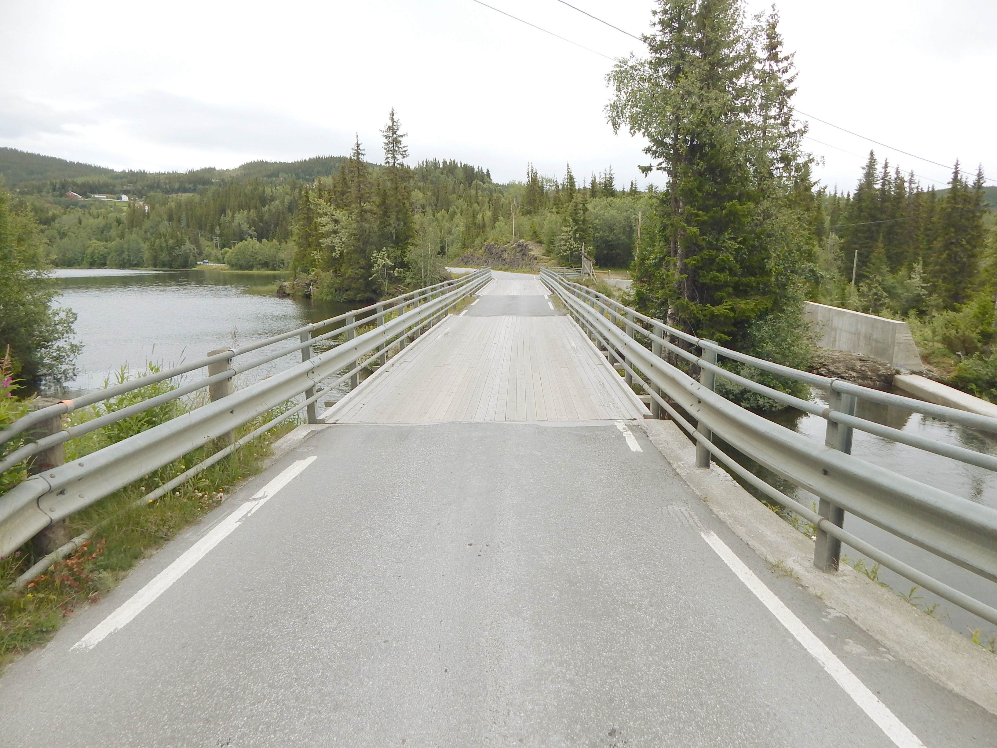 Skøltevegen krysser over demningen i Hedalsfjorden på Skoltebrua (eller Skoltebrue).